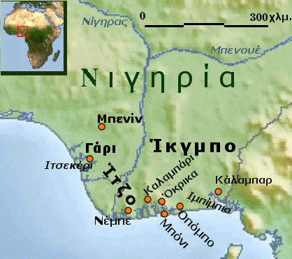 Ιστορία των κρατών Ίτζο και Ίγκμπο